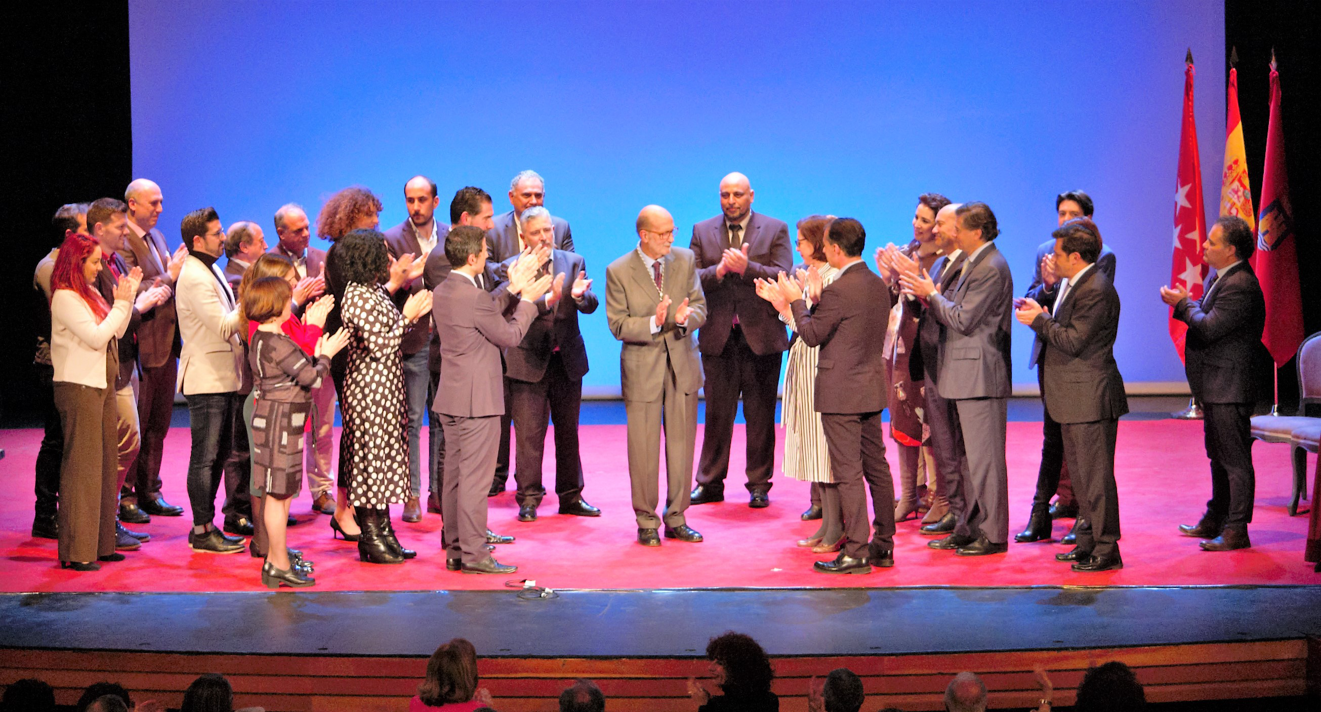 Arsenio Lope Huerta en el acto donde recibió la Medalla de oro de la ciudad de Alcalá de Henares (Comunidad de Madrid - España) el 27 de febrero de 2020 en el Teatro Salón Cervantes.